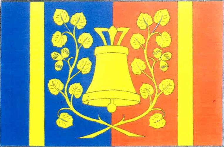 Chlístov, okres Rychnov nad Kněžnou, vlajka